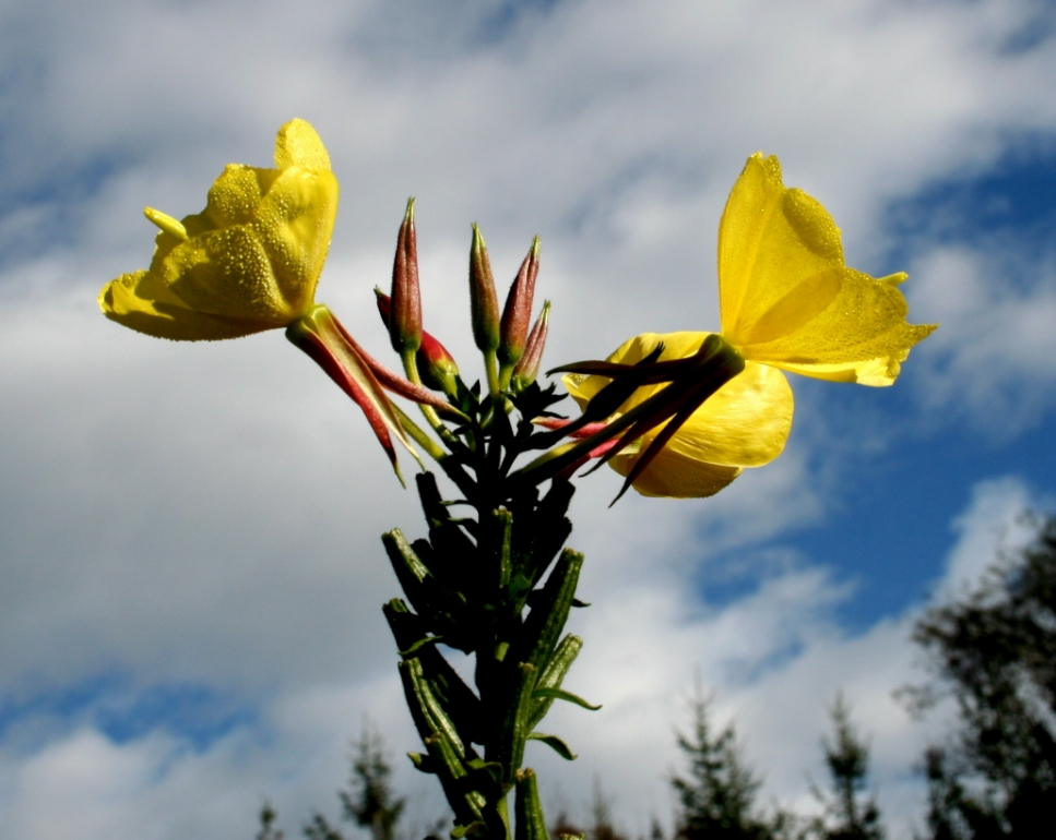 Oenothera_glazioviana (Enagra comune) Località : Cesa, Limana (BL), 330 m s.l.m.